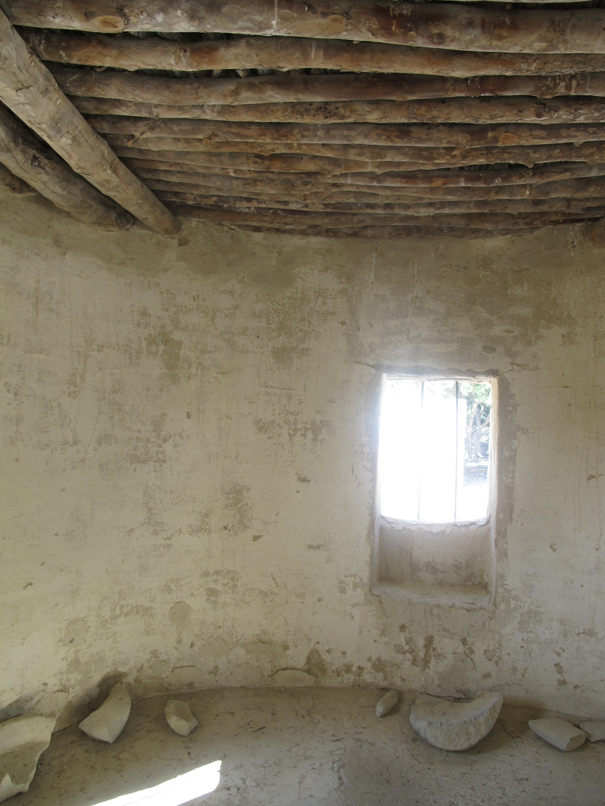 Choirokoitia, Inneres der rekonstruierten Hütten